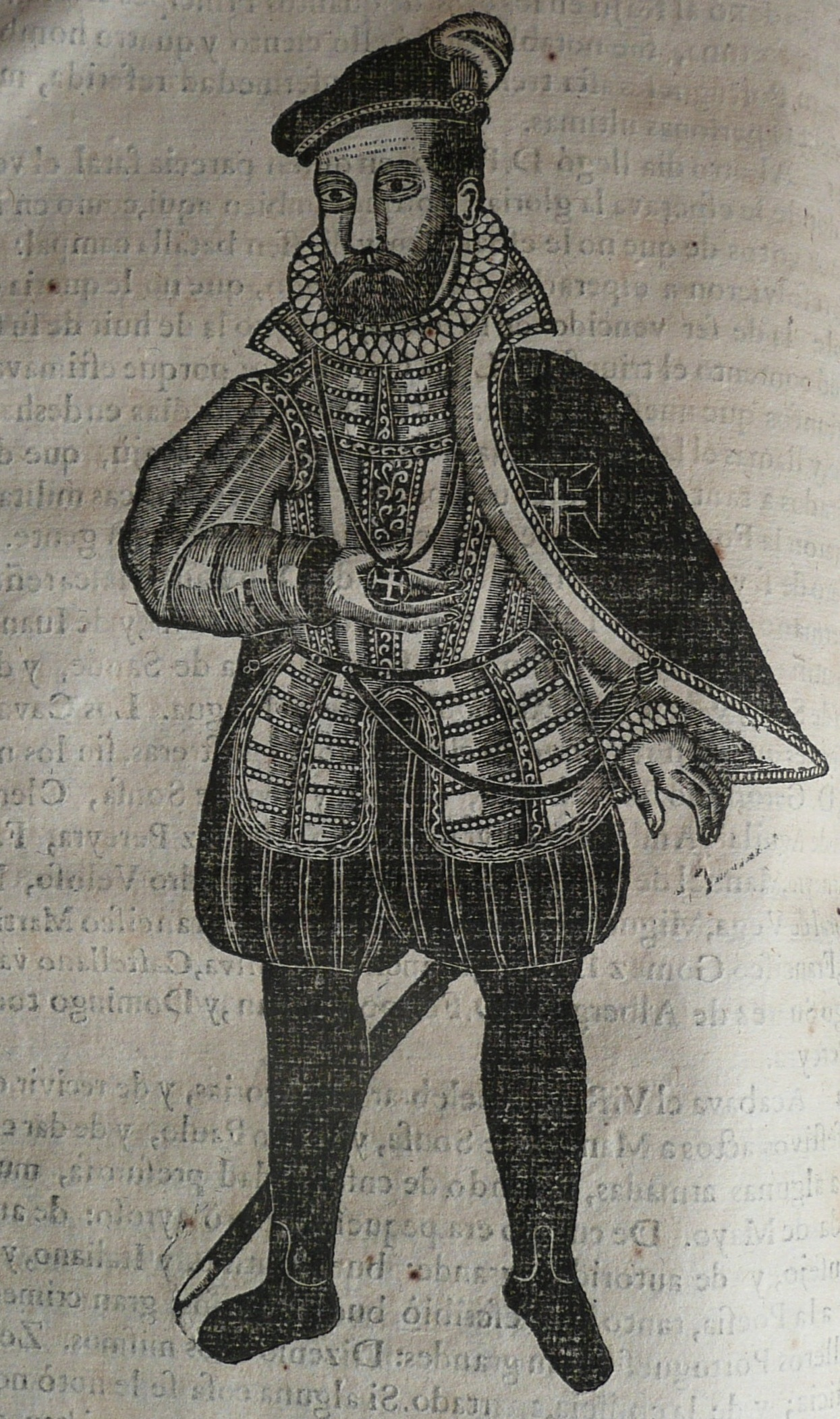 Retrato do 14° vice-rei a Índia, in Ásia portuguesa de Manuel de Faria e Sousa